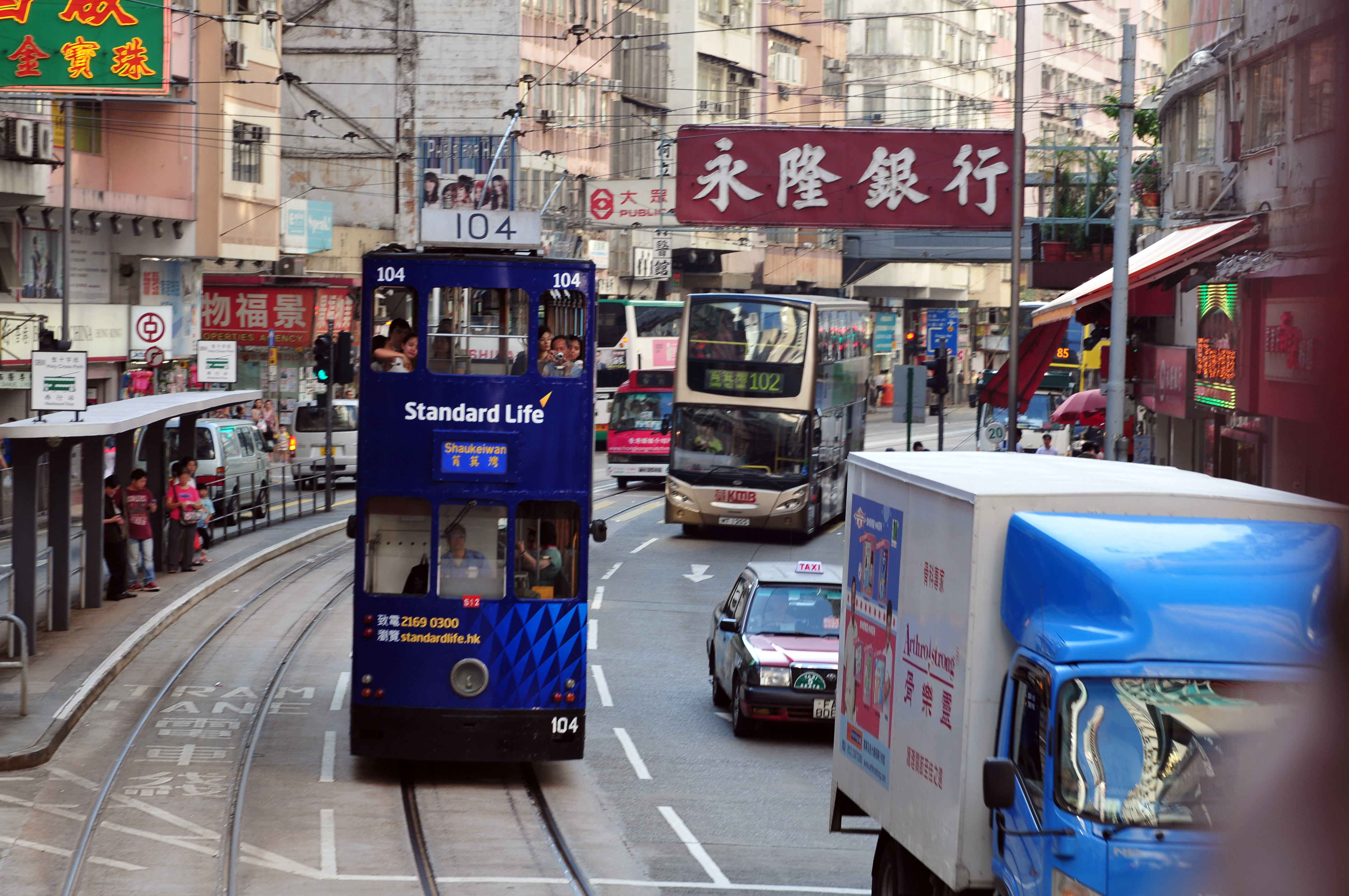 Wikimania 2013 Hongkong